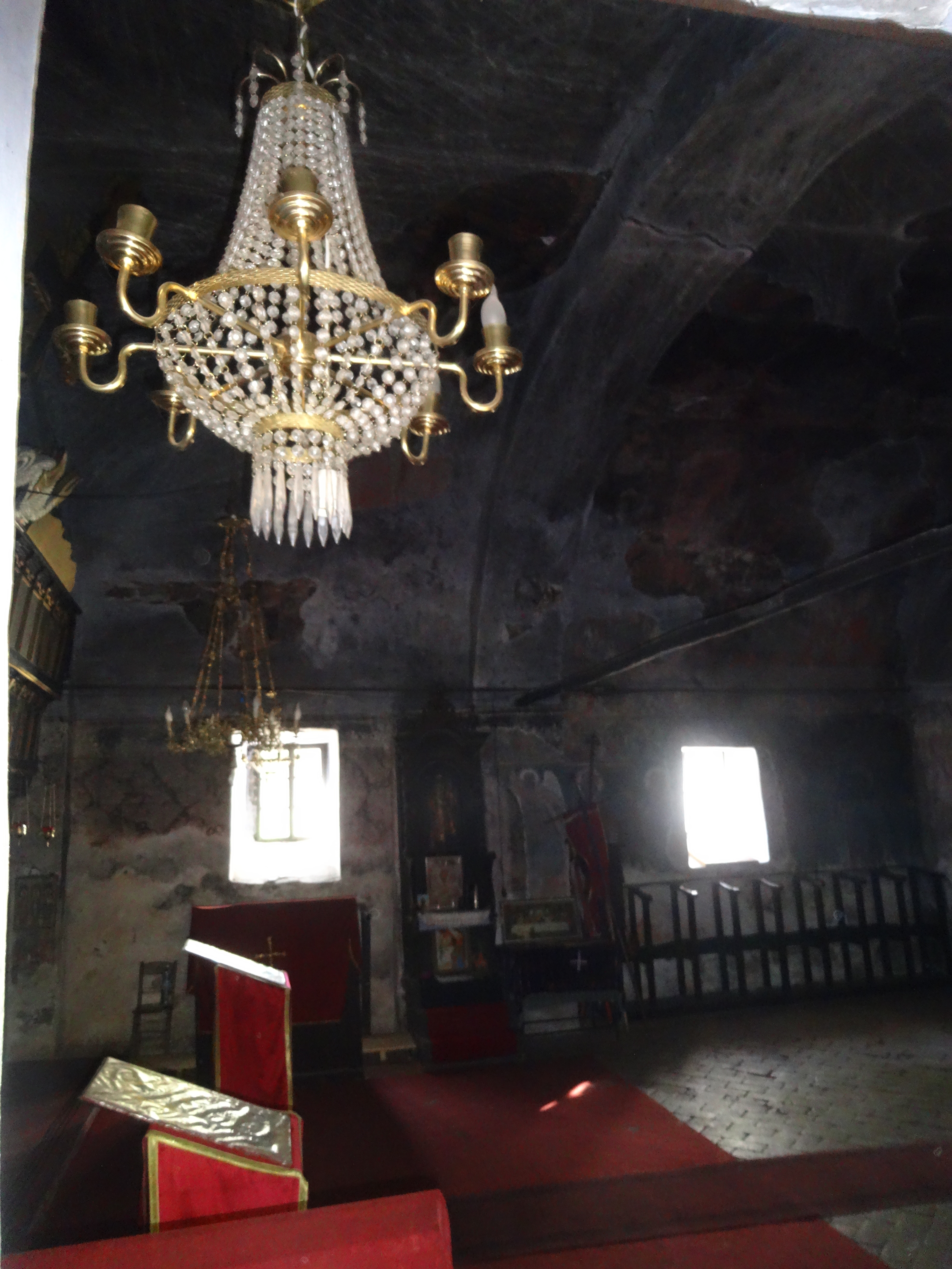 Rudare, Leskovac